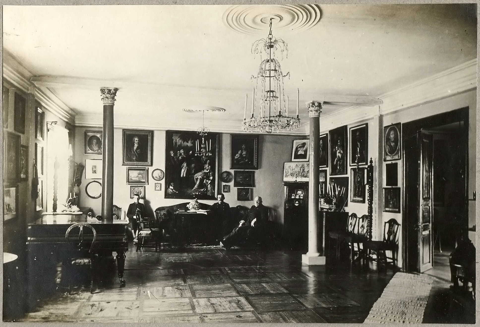 Беларуская (тарашкевіца): Замосьце (Zamoście), сядзіба Ельскіх (Jelski). Аляксандар Ельскі (Alaksandar Jelski) і яго сын Ян (Jan Jelski)